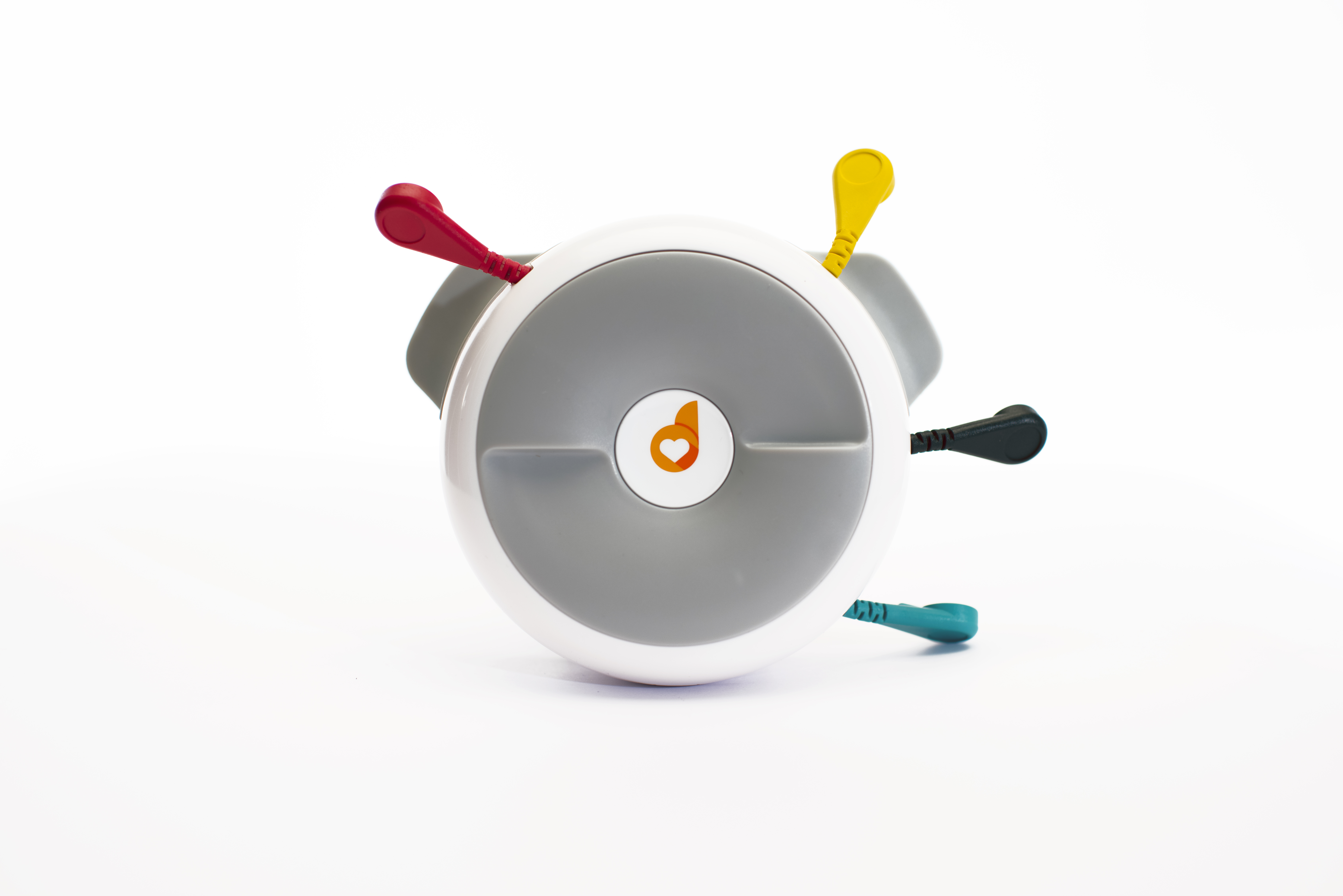 smartphone ecg